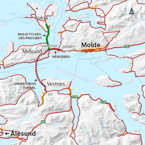 Statens Vegvesen skisse over Møreaksen - en påtenkt fergefri forbindelse på E39 Kyststamveien over Romsdalsfjorden, mellom Molde og Ålesund.